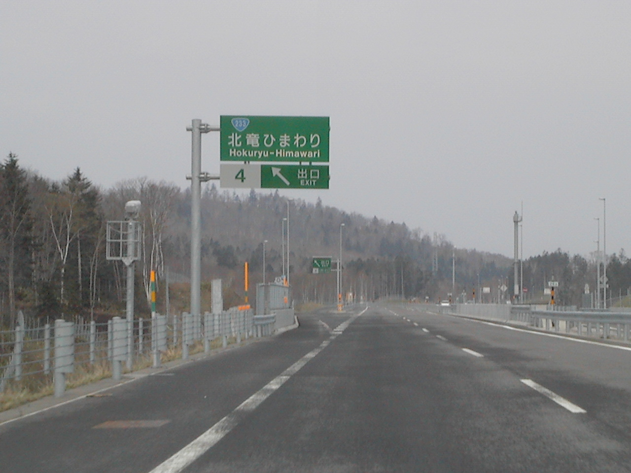 北竜ひまわりICの出口案内標識